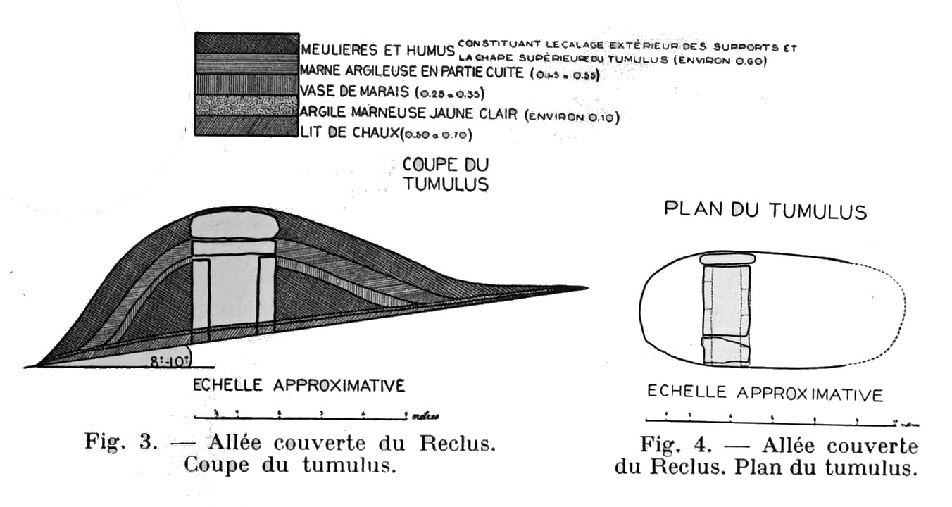 entre 2 guerre.